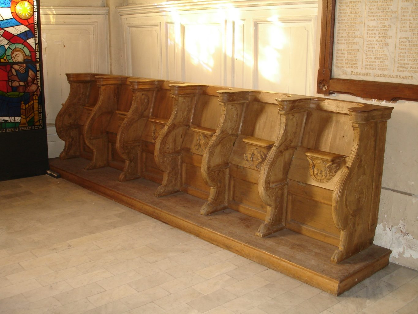 Stalles du XVIe siècle (classées monument historique) de l'église de Soisy-sous-Montmorency, Val-d'Oise (France) - Décembre 2006 Photo personnelle de clicsouris